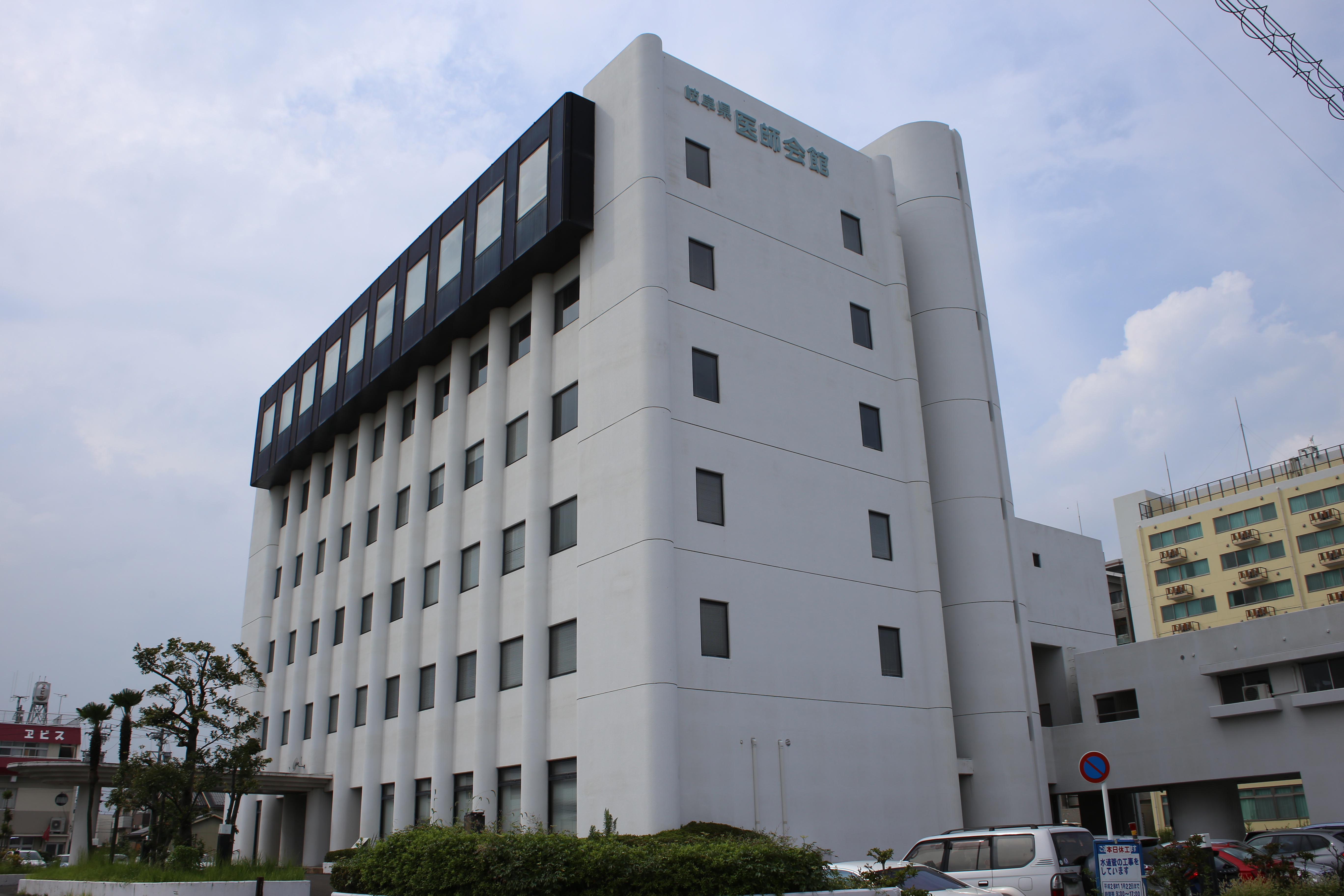 岐阜県岐阜市藪田南の岐阜県医師会館を南側公道東側より撮影